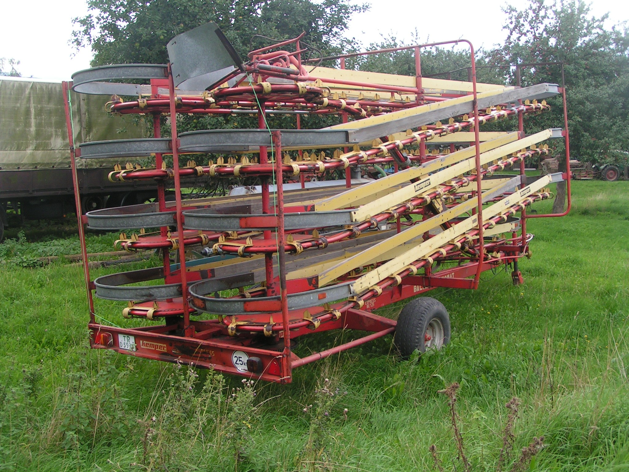 Ballensammelwagen